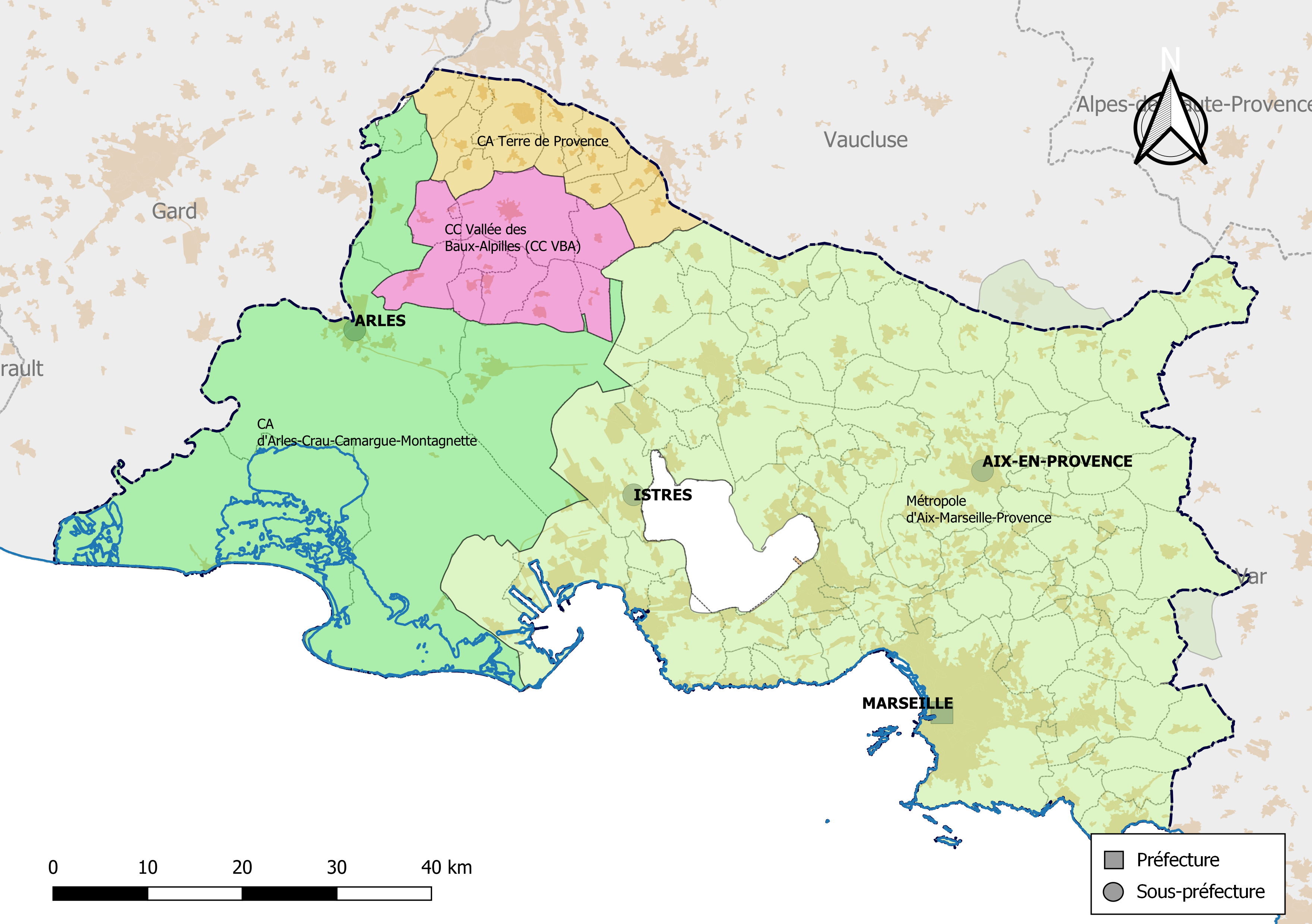 Carte des intercommunalités du département des Bouches-du-Rhône, France. Composition au 1er janvier 2019